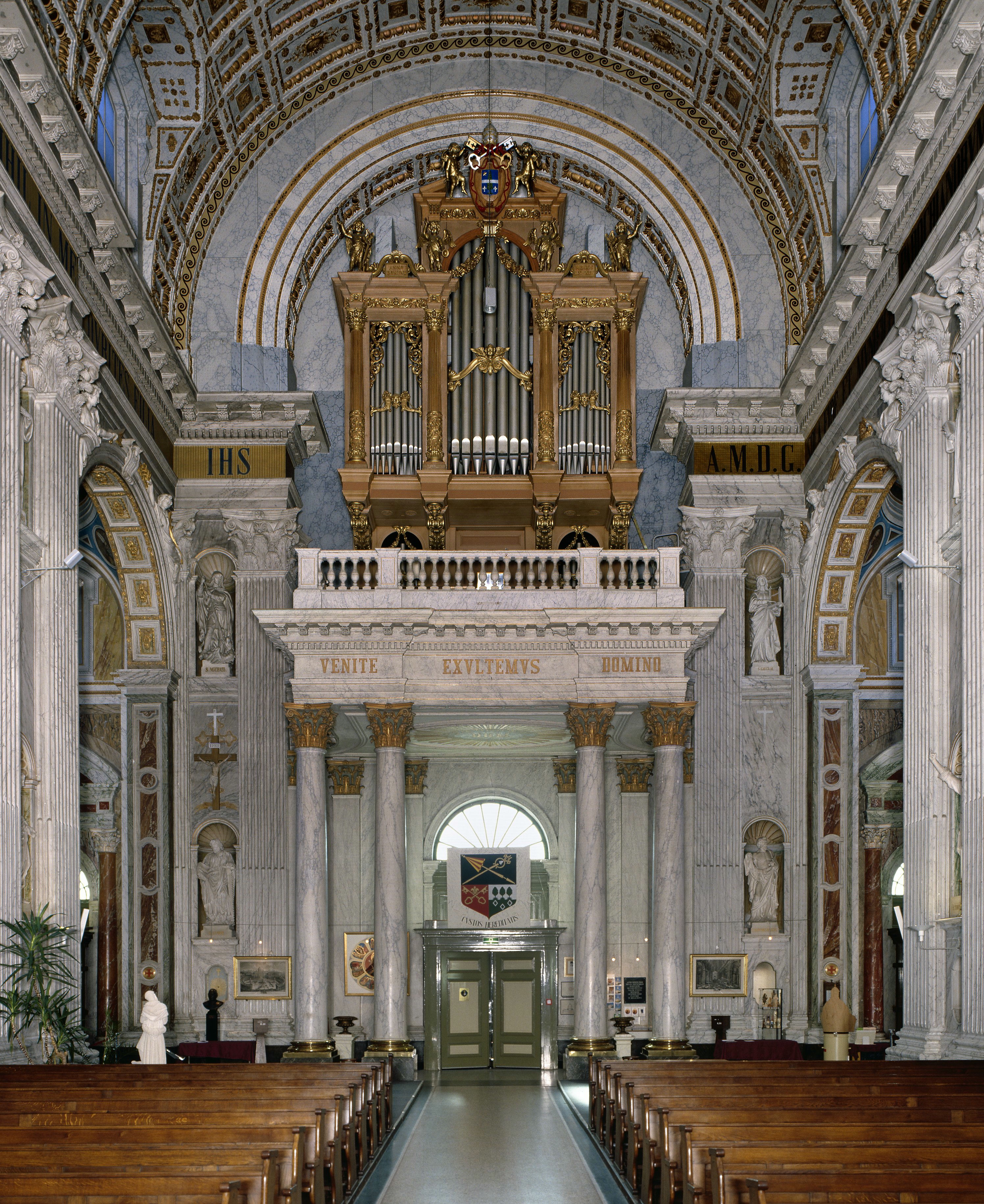 Basiliek Van De Heilige Agatha En Barbara: Interieur, aanzicht orgel, orgelnummer 1195 (opmerking: Gefotografeerd voor Het Historische Orgel in Nederland 1886-1894, bladzijde 313)